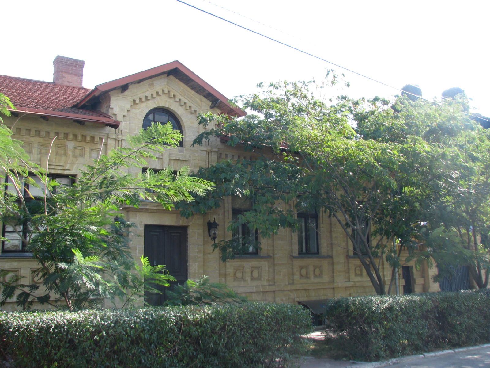 Житловий будинок, Херсон, Гоголя вул., 16